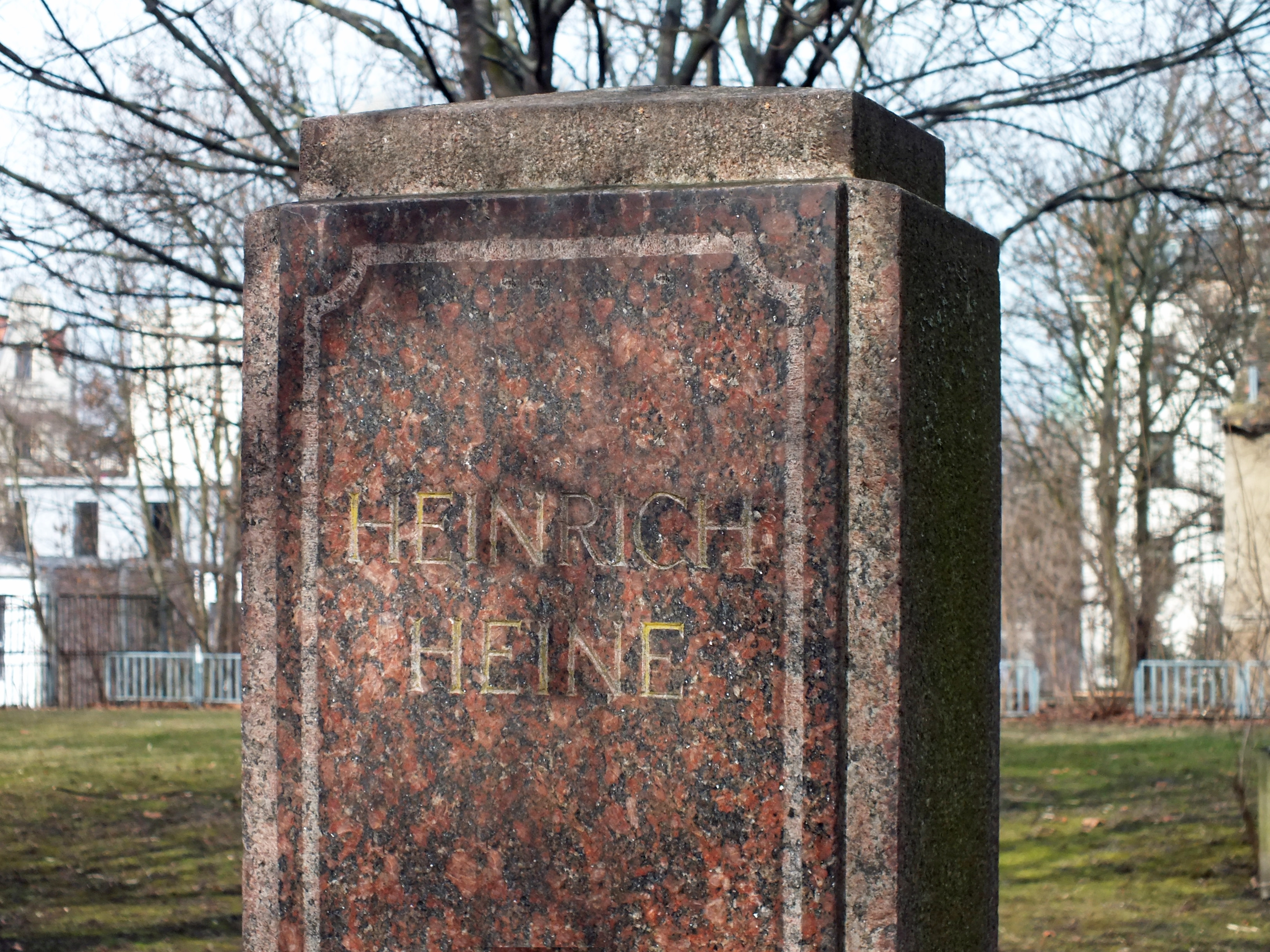 Das Heinrich-Heine-Denkmal in Leipzig im Gartengelände des Volkshauses